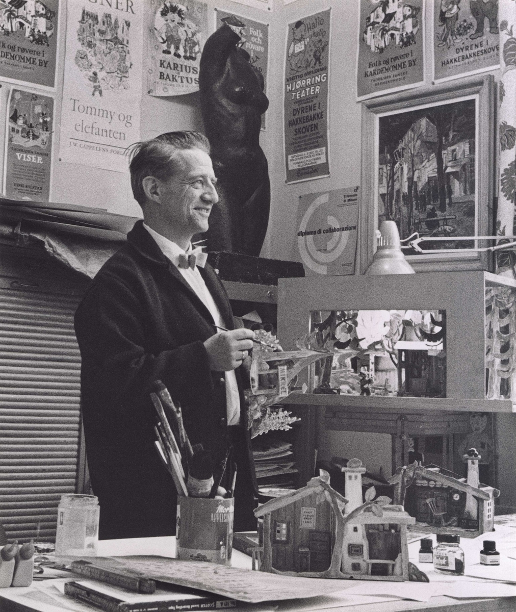 Thorbjørn Egner (1912-1990) var en norsk tegner, forfatter, visedikter og komponist.